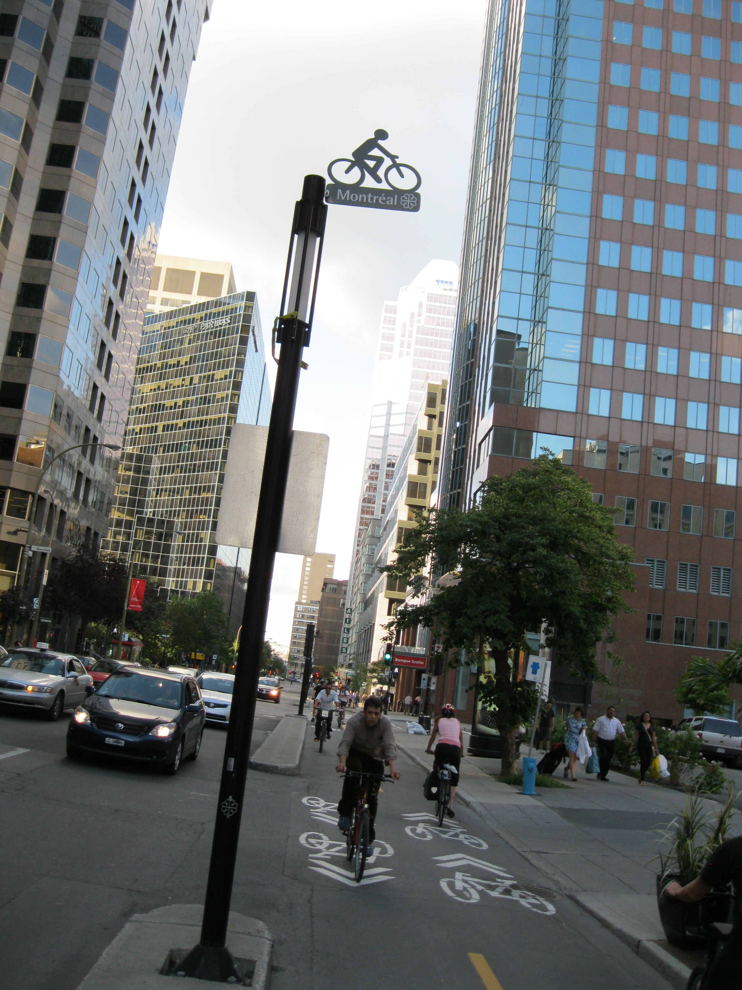 La piste Claire-Morissette est une piste cyclable de Montréal situé sur le boulevard De Maisonneuve. Elle tire son nom d'une activiste du vélo, Claire Morissette.